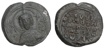 Пячатка Усевалада Яраславіча